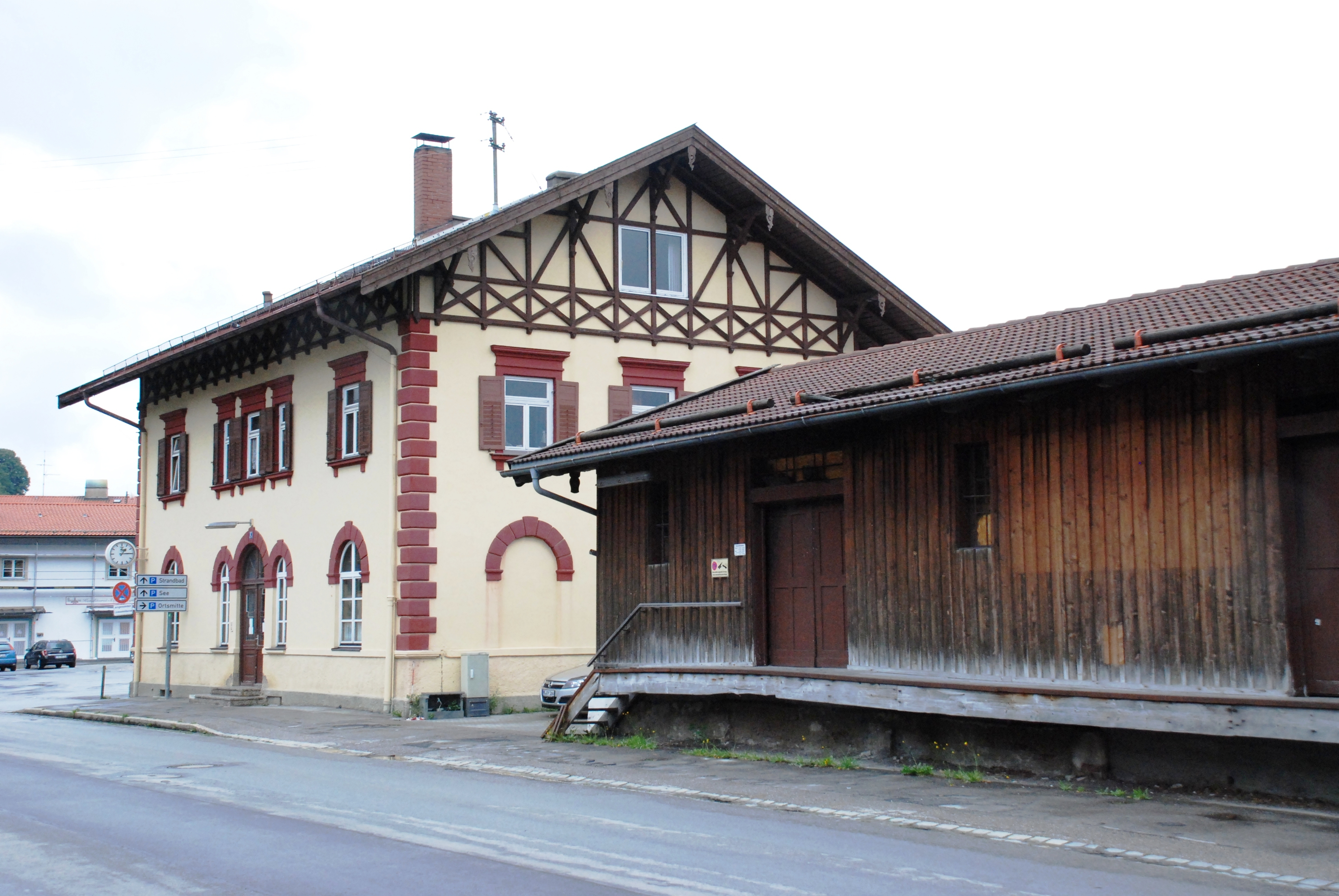 Bahnhof und hölzerner Güterschuppen in der Wiesseer Straße 11 in Gmund am Tegernsee, Landkreis Miesbach, Regierungsbezirk Oberbayern, Bayern. Als Baudenkmal in der Bayerischen Denkmalliste aufgeführt. Laut Gebäudetafel im Jahr 1883 erbaut.